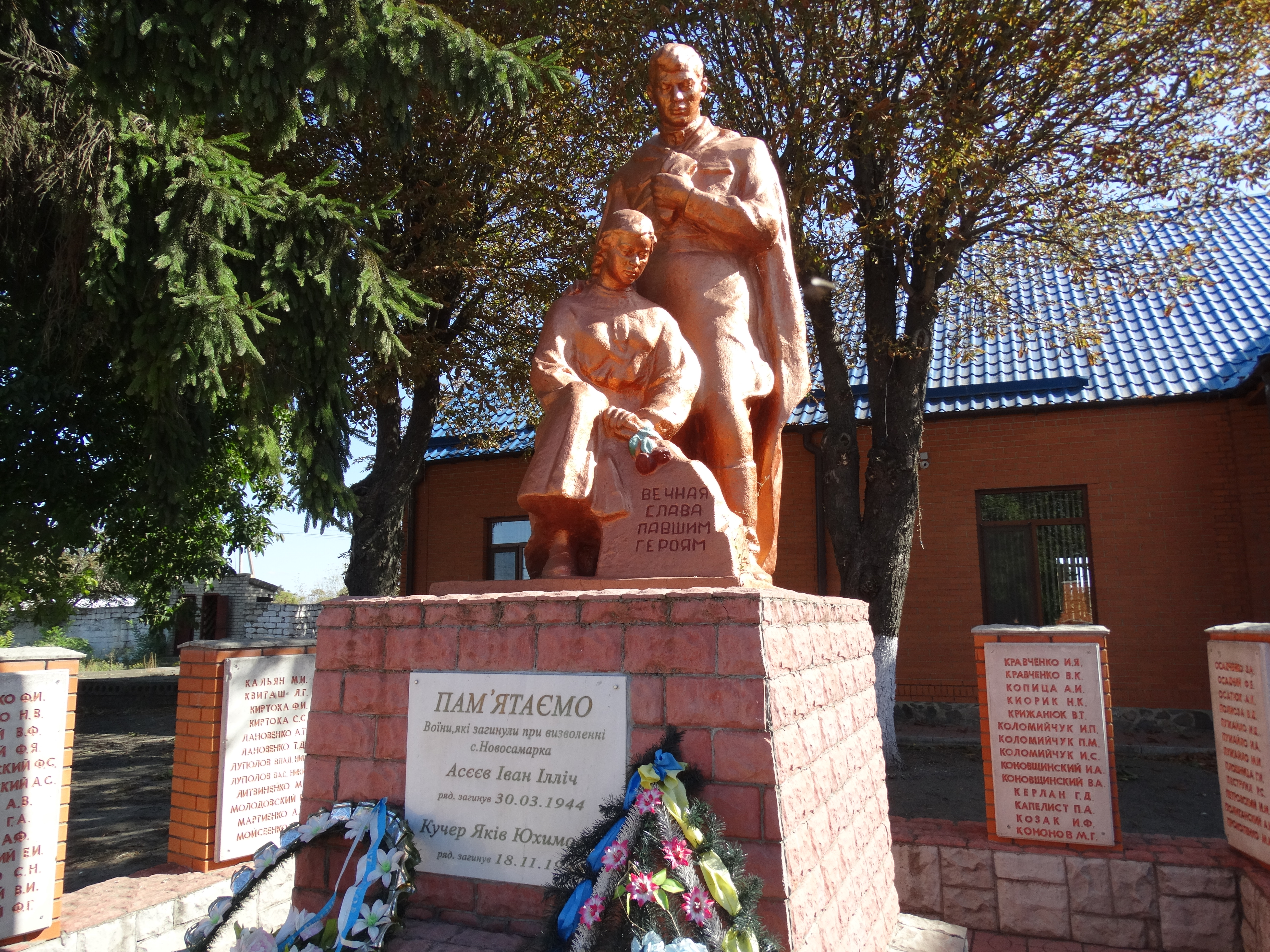 Братська могила 11 радянських воїнів та рядового Кучер Я. Є., загиблих при звільненні села в квітні 1944 року